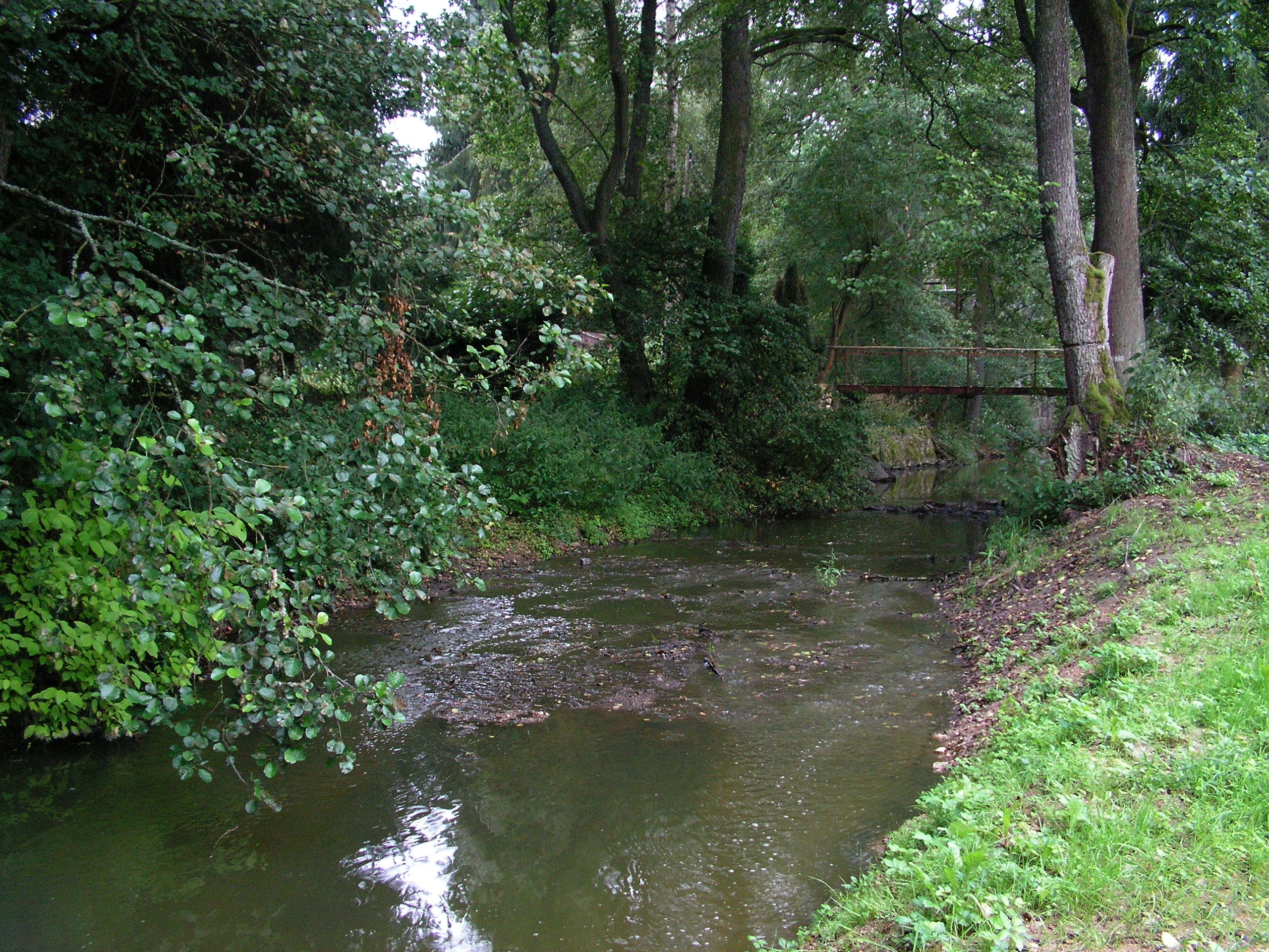 Chotýšanka pod Smikovským rybníkem u silnice II/112